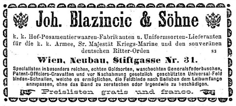 Annonce des k.k. Hoflieferanten Joh. Blazincic & Söhne, Wien. in Die Vedette, 30. September 1888, S. 642